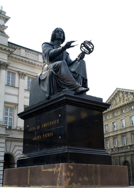 Warszawa (Polska)